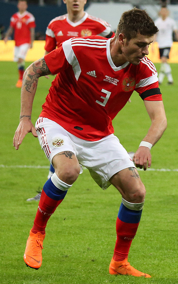 Сборная России проиграла французам